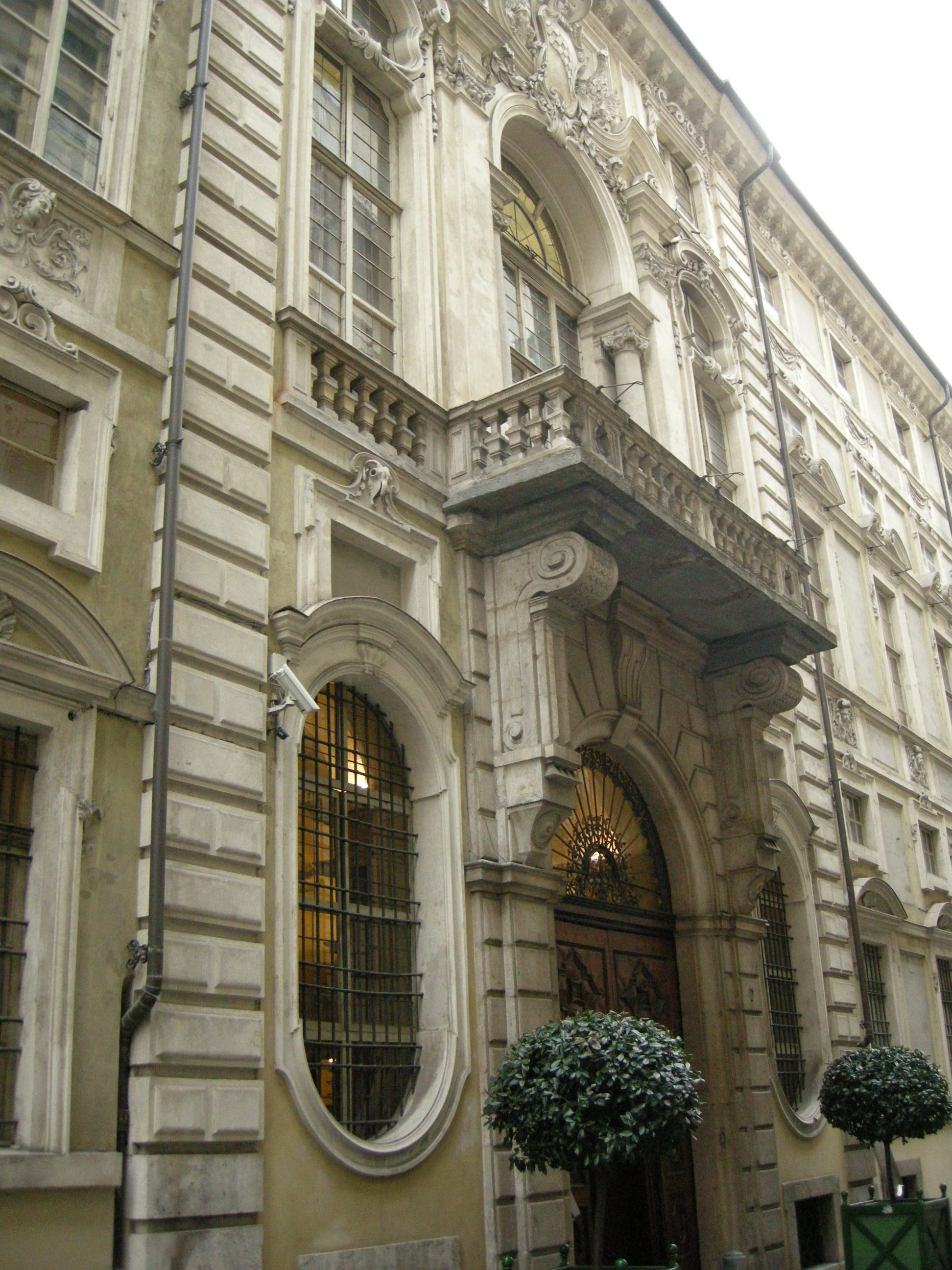 Palazzo barolo